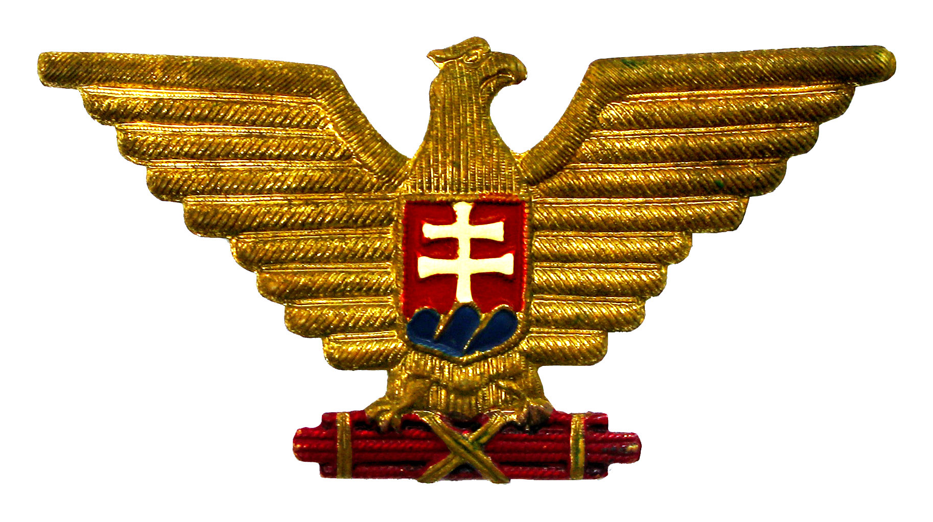 Čiapkový odznak používaný v období vojnovej Slovenskej republiky v rokoch 1939 až 1945